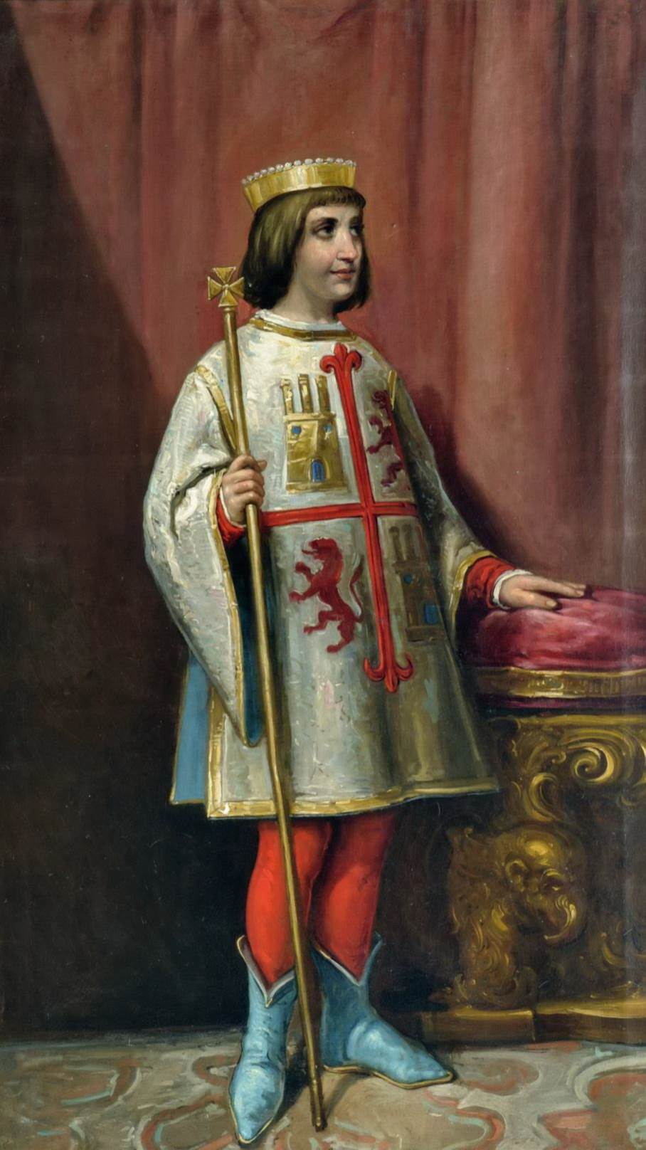 Retrato imaginario del rey Enrique I de Castilla (1204-1217). Fue hijo del rey Alfonso VIII de Castilla y de la reina Leonor de Plantagenet. Reinó entre los años 1214 y 1217, en que falleció como consecuencia de un accidente en la ciudad de Palencia. Fue sucedido por su hermana, la reina Berenguela I de Castilla, quien inmediatamente abdicó en favor de su hijo, Fernando III de Castilla.